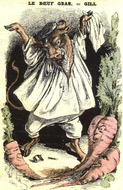 Le Bœuf Gras du Carnaval de Paris vu par Gill. Cette image a inspiré en 1998 Rafael Estève pour la création du Géant-Bœuf du Carnaval de Paris.